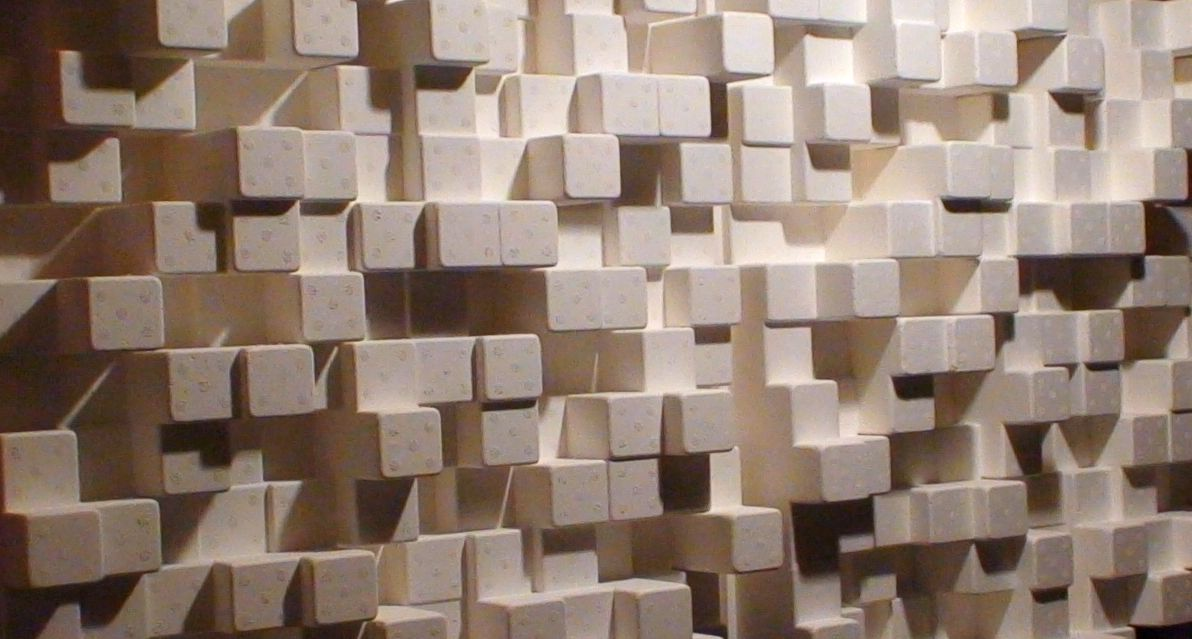 Ein 2D-Diffusor nach der QRD Methode berechnet